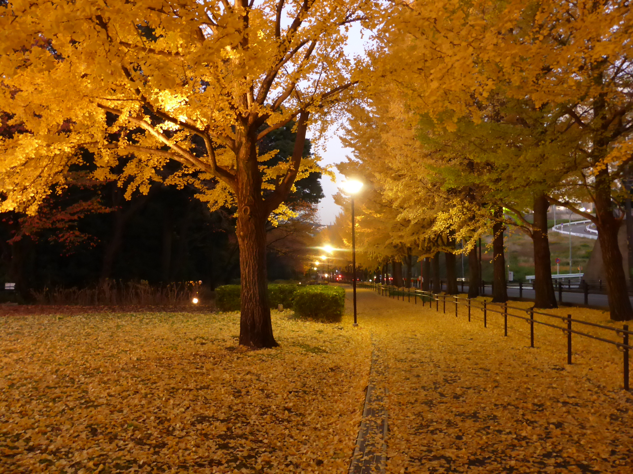 神奈川県立保土ヶ谷公園（横浜市保土ヶ谷区）